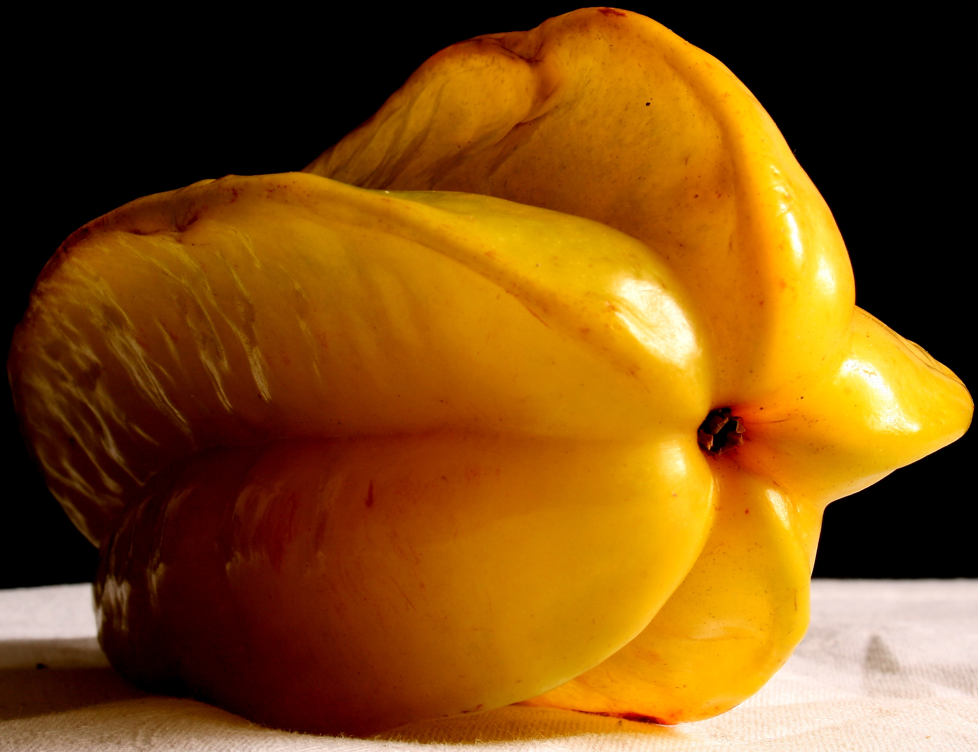 Karambola_Malaysia_2008-2-20